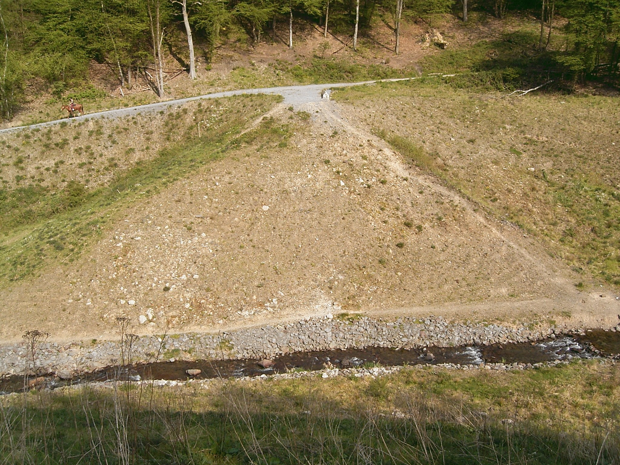 Ehemalige Untere Herbringhauser Talsperre in Wuppertal